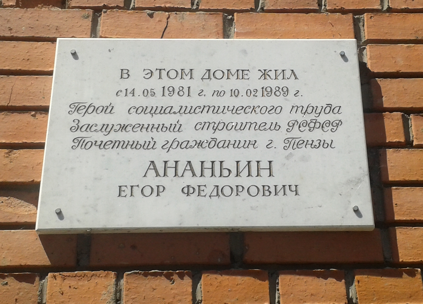 Мемориальная доска Герою Социалистического Труда Егору Фёдоровичу Ананьину на жилом доме по адресу: г. Пенза, ул. Урицкого, 18.